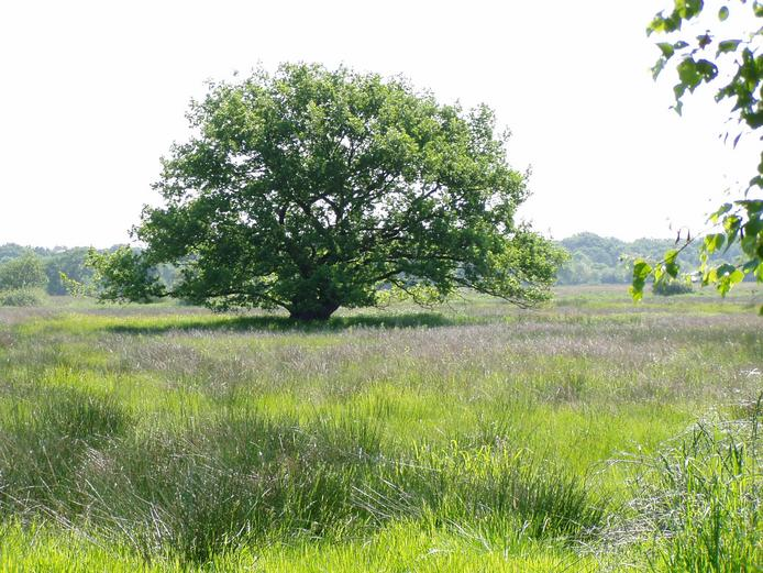 Mähbare Grünlandflächen und Eiche im Stoteler Moor (Teil des Naturschutzgebiets „Hahnenknooper Moore“)